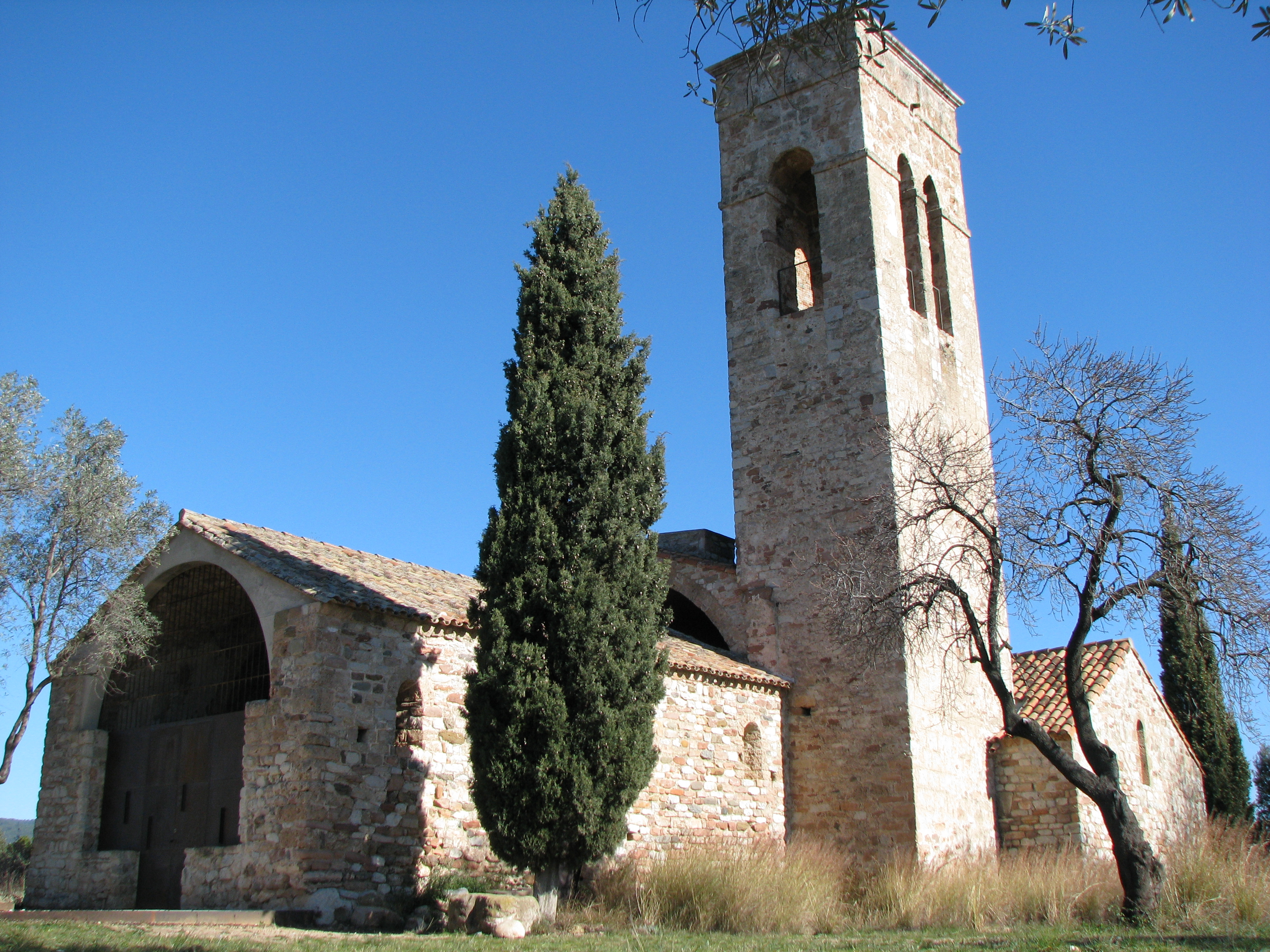 Esglèsia de Sant Esteve de Castellar Vell, Castellar del Vallès, provincia de Barcelona, Espanya.